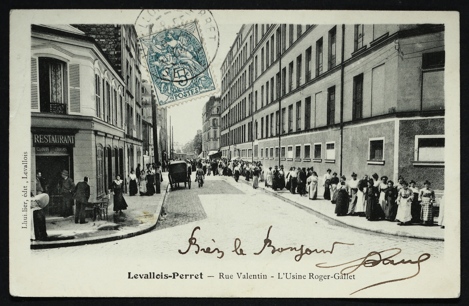 Levallois-Perret.Rue Valentin